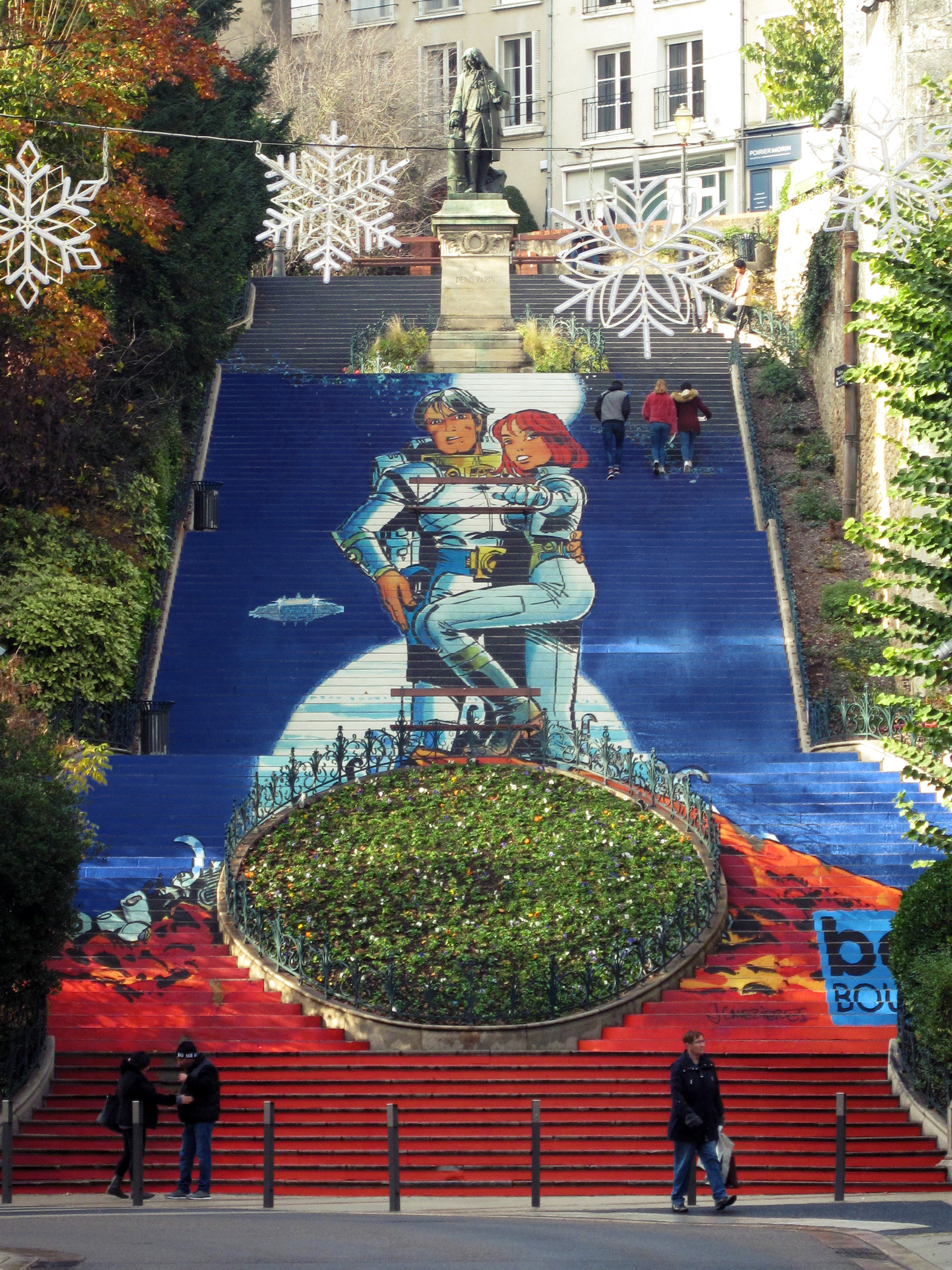 À l’occasion de la 35e édition du festival de bande dessinée bd BOUM à Blois, l’escalier Denis-Papin a été entièrement recouvert par un dessin de Valérian et Laureline, durant l’automne-hiver 2018-2019 ; clin d’œil à l’une des expositions qui était consacrée à l’œuvre.